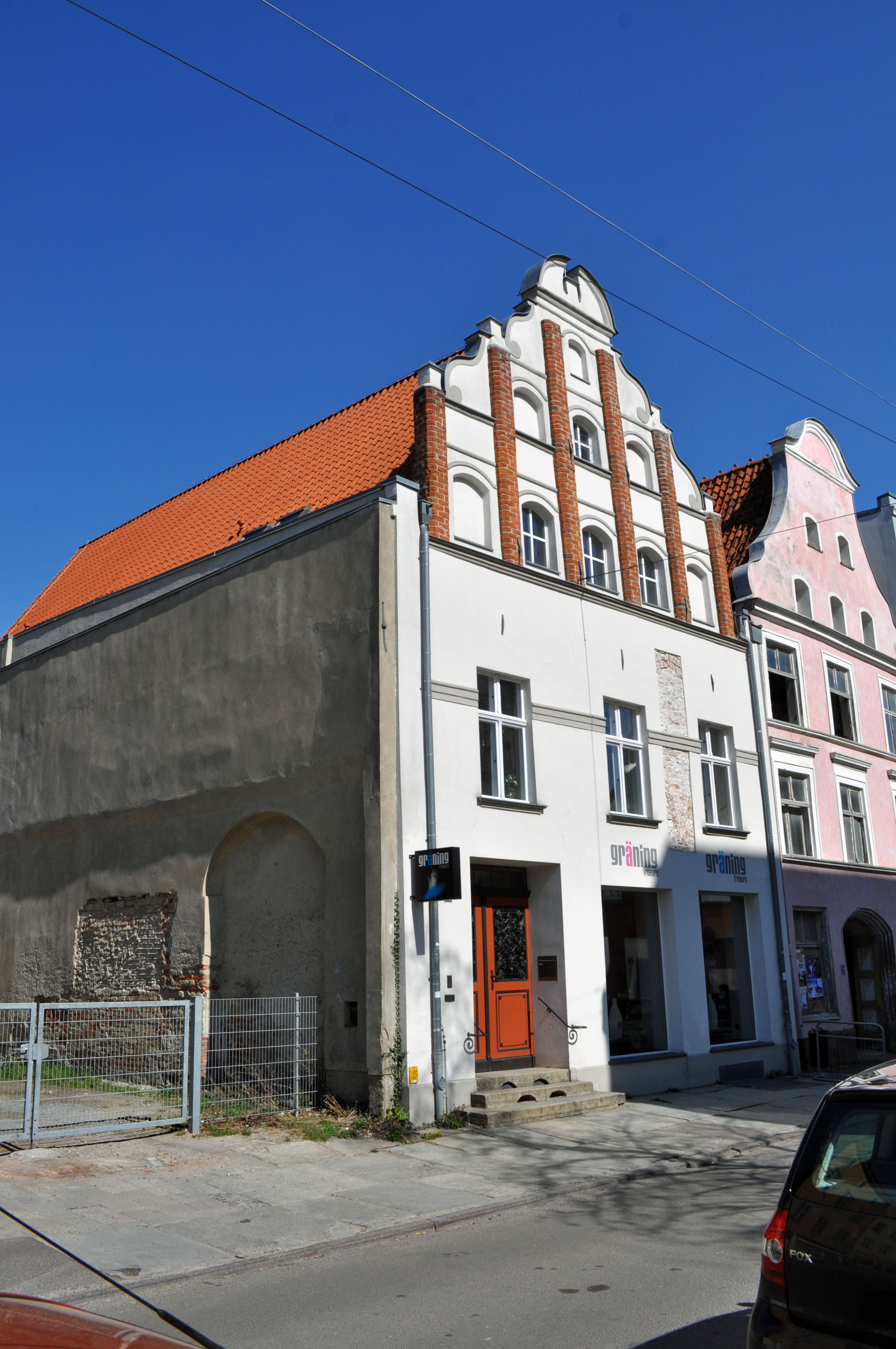 Gebäude bzw. Gebäudedetail in Stralsund. Straße und Hausnummer siehe Dateiname.